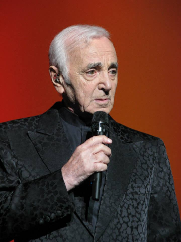 Charles Aznavour (b. May 22, 1924) – French singer